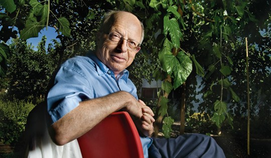 פרופסור לכימיה איתמר וילנר